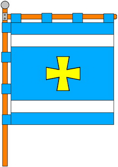 Хоругва села Великі Межирічі